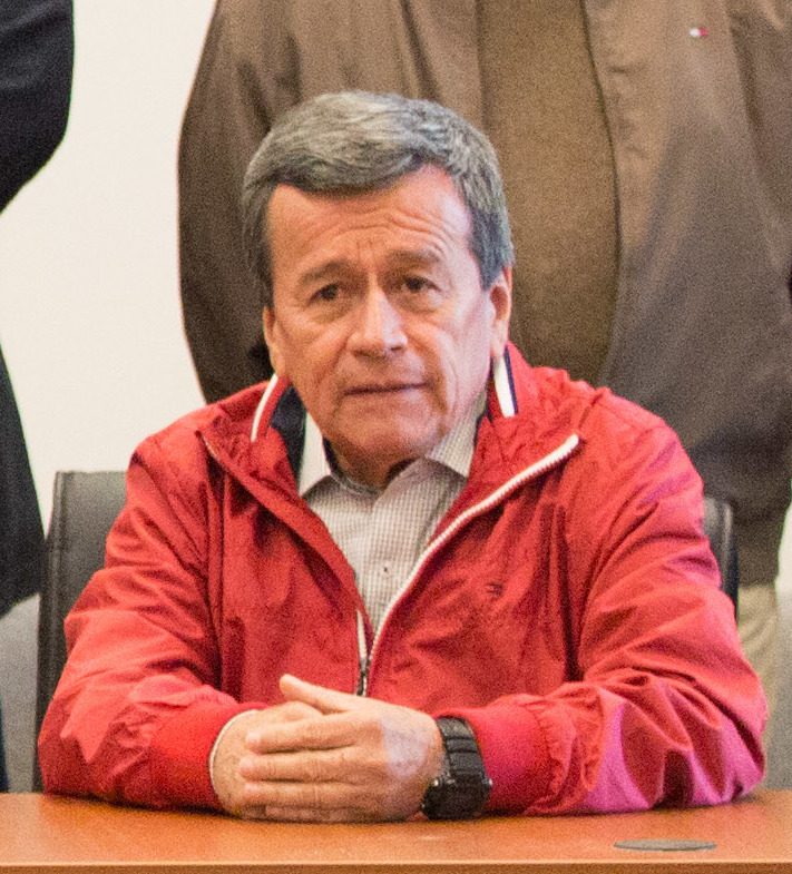 5to ciclo de negociaciones de paz entre el ENL y el Gobierno de Colombia